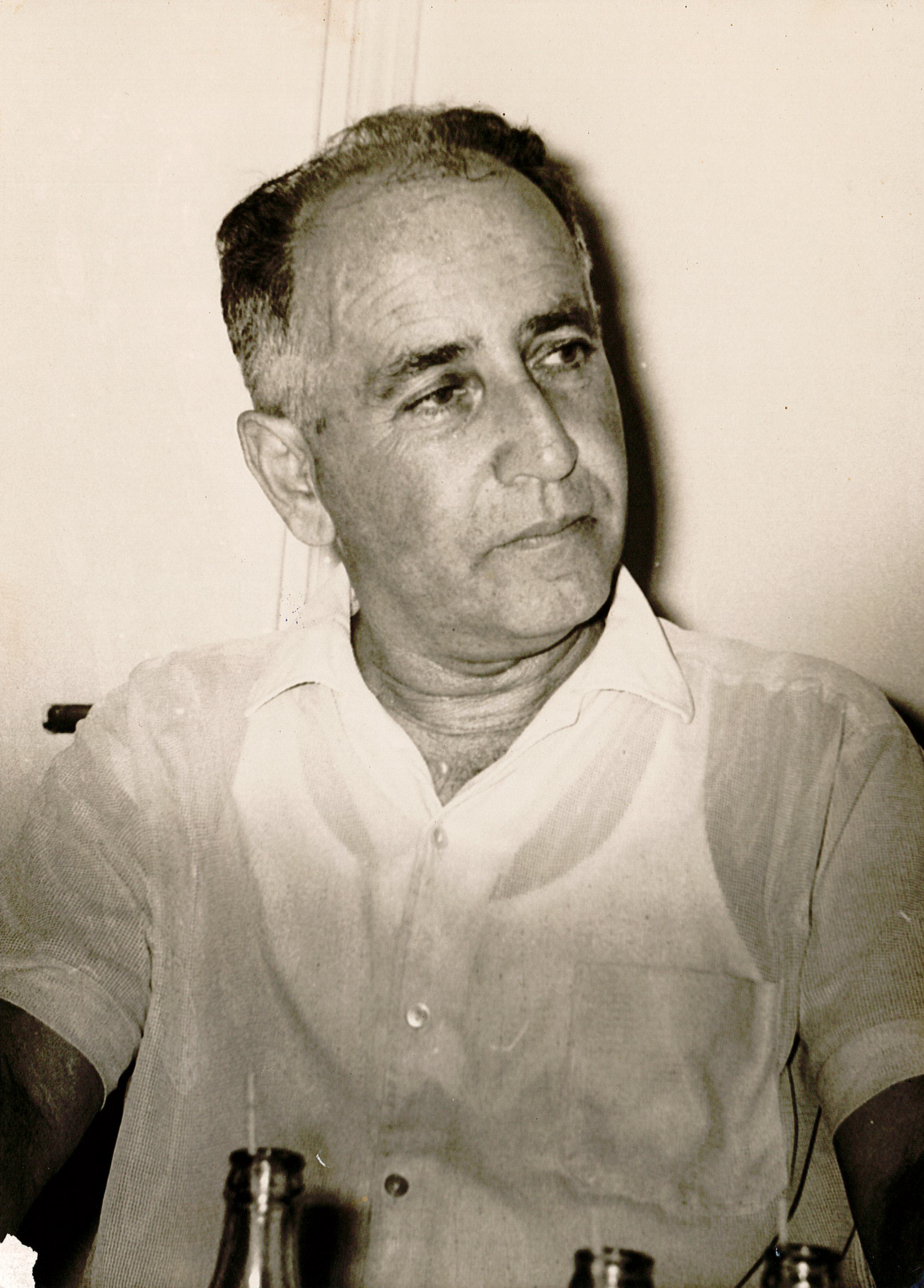 פרץ מרחב בשנות השבעים